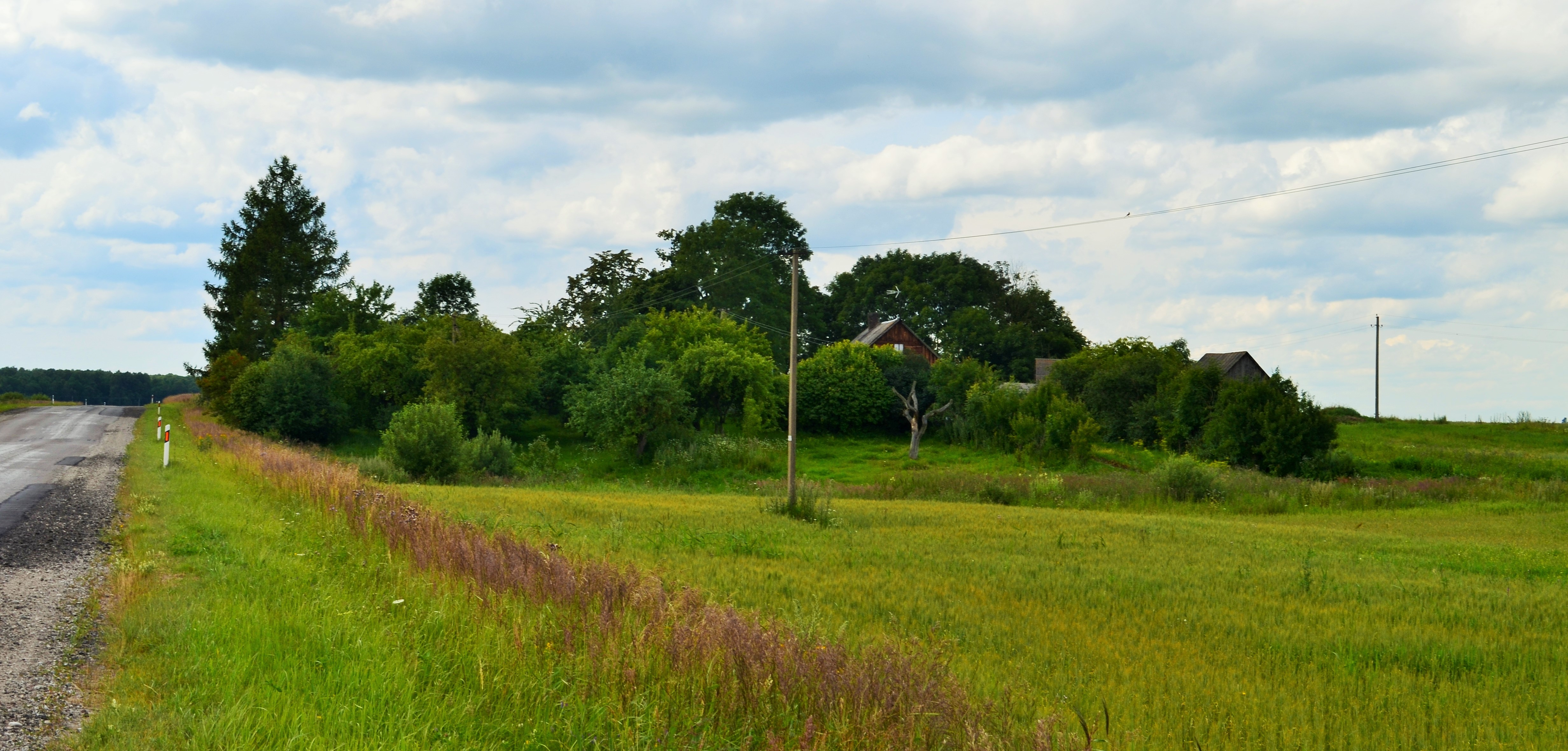 Kačėniškiai, Ukmergės raj.